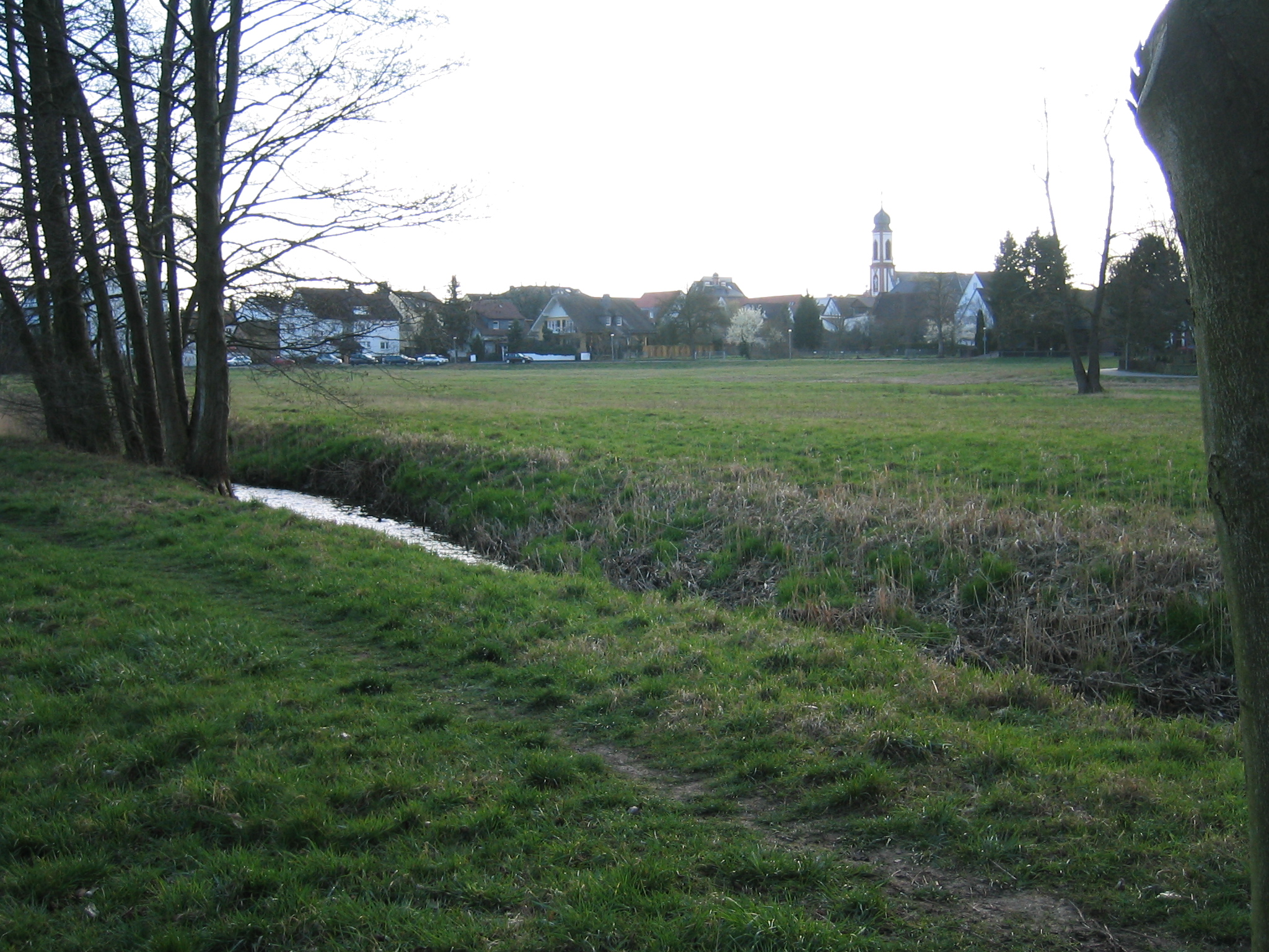 Heusenstamm, Stadt mit Fluss Bieber im Vordergrund